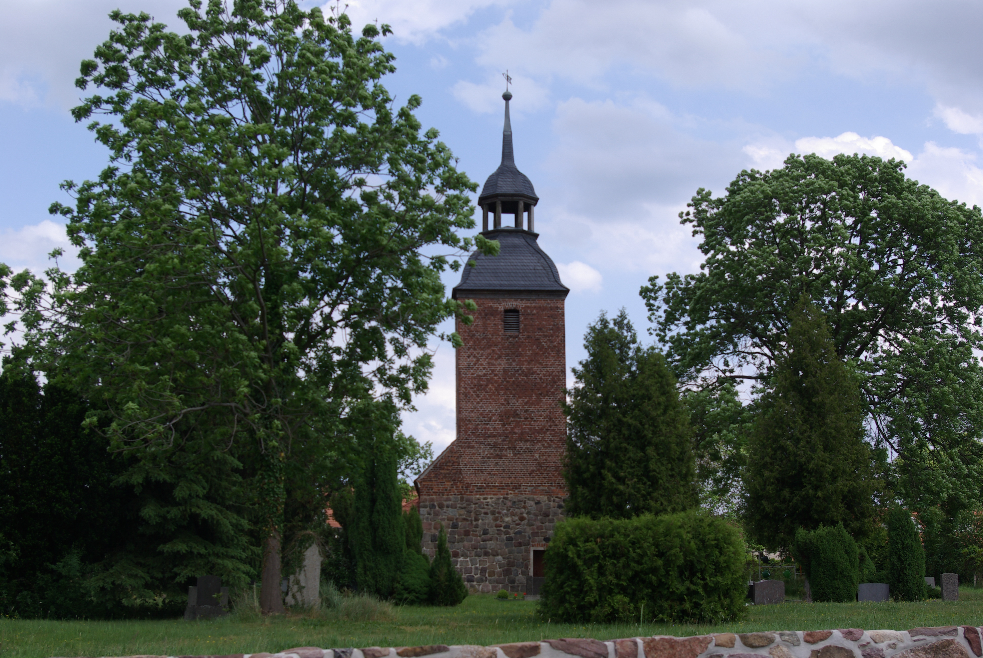 Jüterbog, Ortsteil Markendorf, Die Kirche stammt im Ursprung aus dem 13. Jahrhundert. Sie steht unter Denkamlschutz.